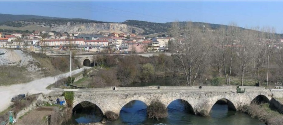 Vista parcial de Nanclares de la Oca desde el río Zadorra. Al fondo, su cantera antigua.